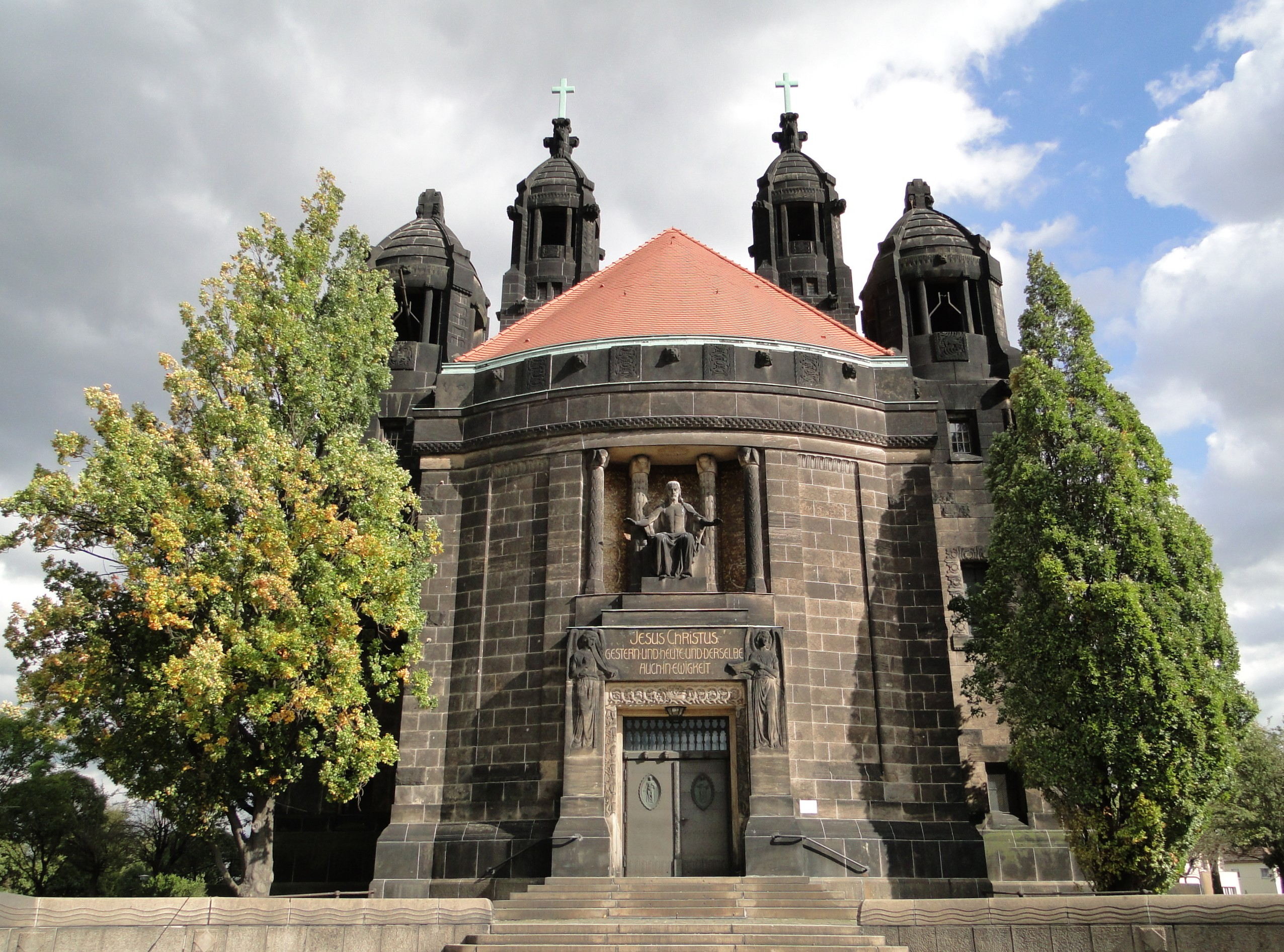 Christuskirche in Dresden, Front